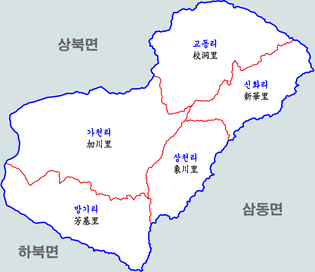 울주군 삼남면 행정구역도